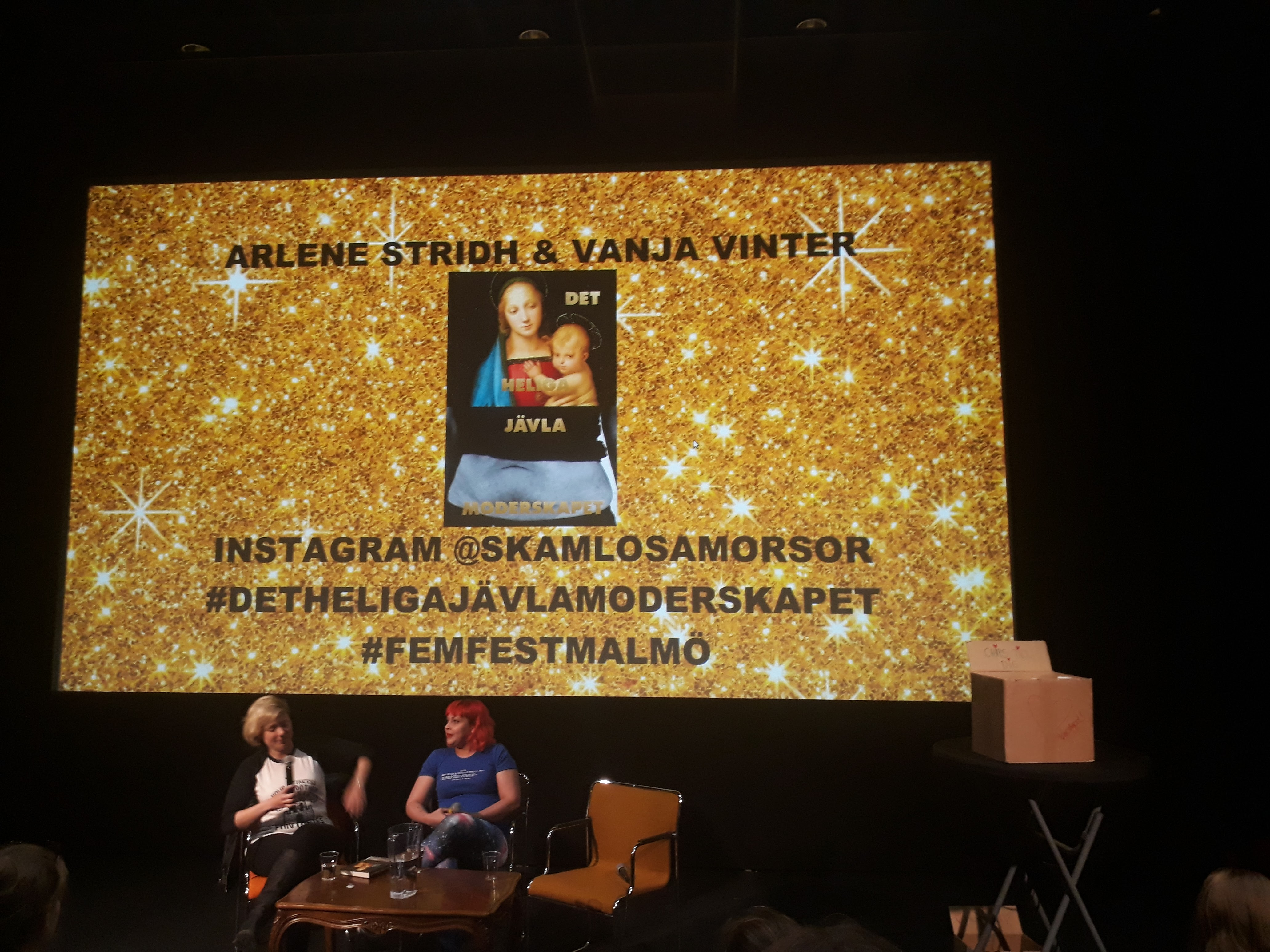 Arlene Stridh och Vanja Vinter har författarsamtal och boksignering för Det heliga jävla moderskapet. Feministisk festival 2017.